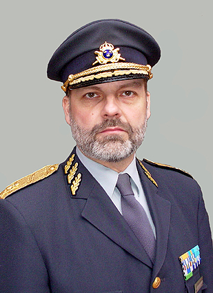 Generalmajor Anders Brännström